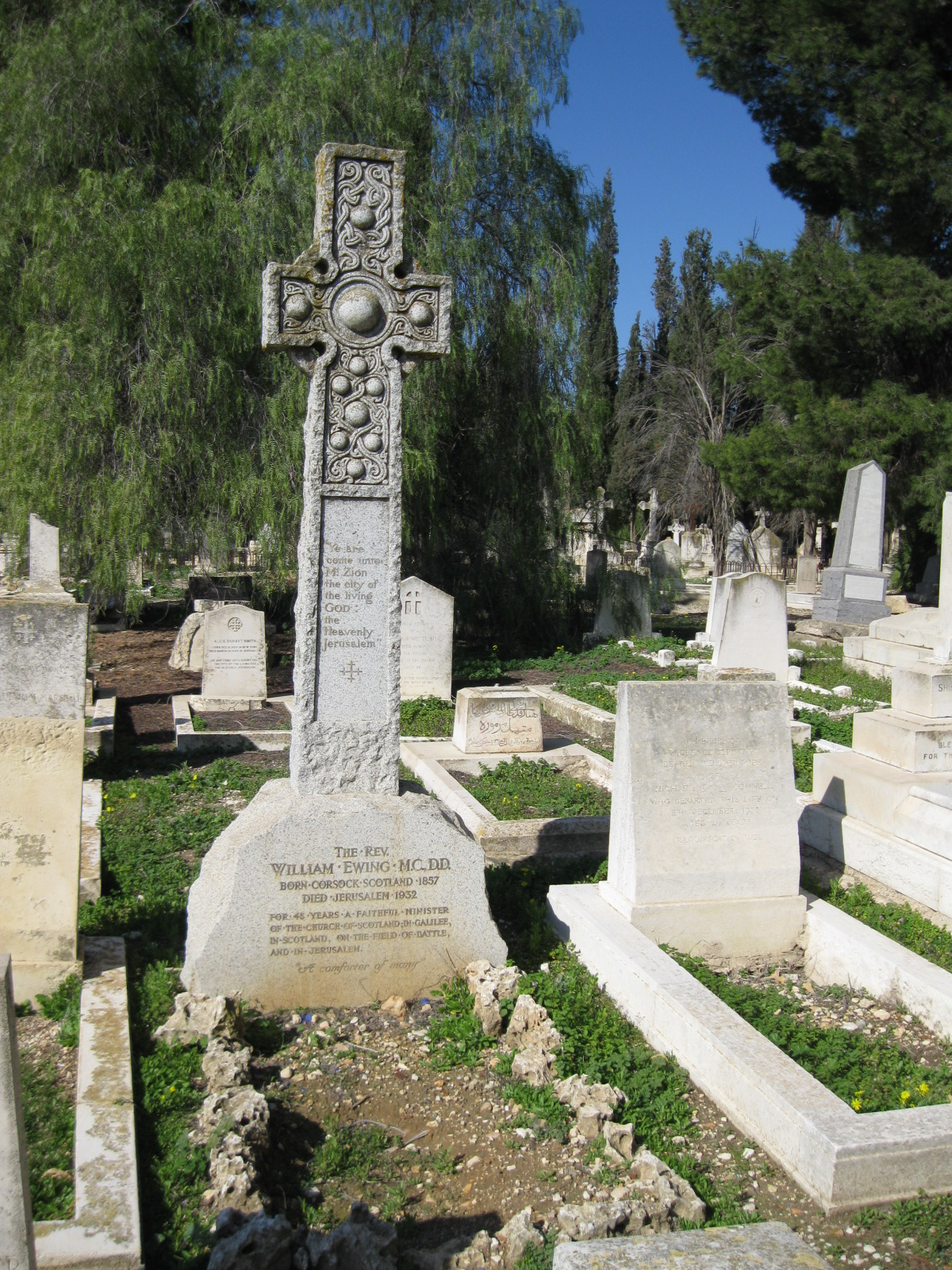 בית הספר גובאט הוא בית ספר פרוטסטנטי ששימש תחילה כבית ספר מקצועי לנערים ערבים. נקרא על שם סמואל גובאט, הבישוף הפרוטסטנטי של ירושלים שהקים אותו. מ-1967 שוכן בו מכון אמריקאי לחקר ארץ הצבי, מכללה אוניברסיטאית אמריקאית. בחצר המכון שוכן בית הקברות הפרוטסטנטי. This is a photo of a heritage building in Israel. Its ID is 1-3000-807